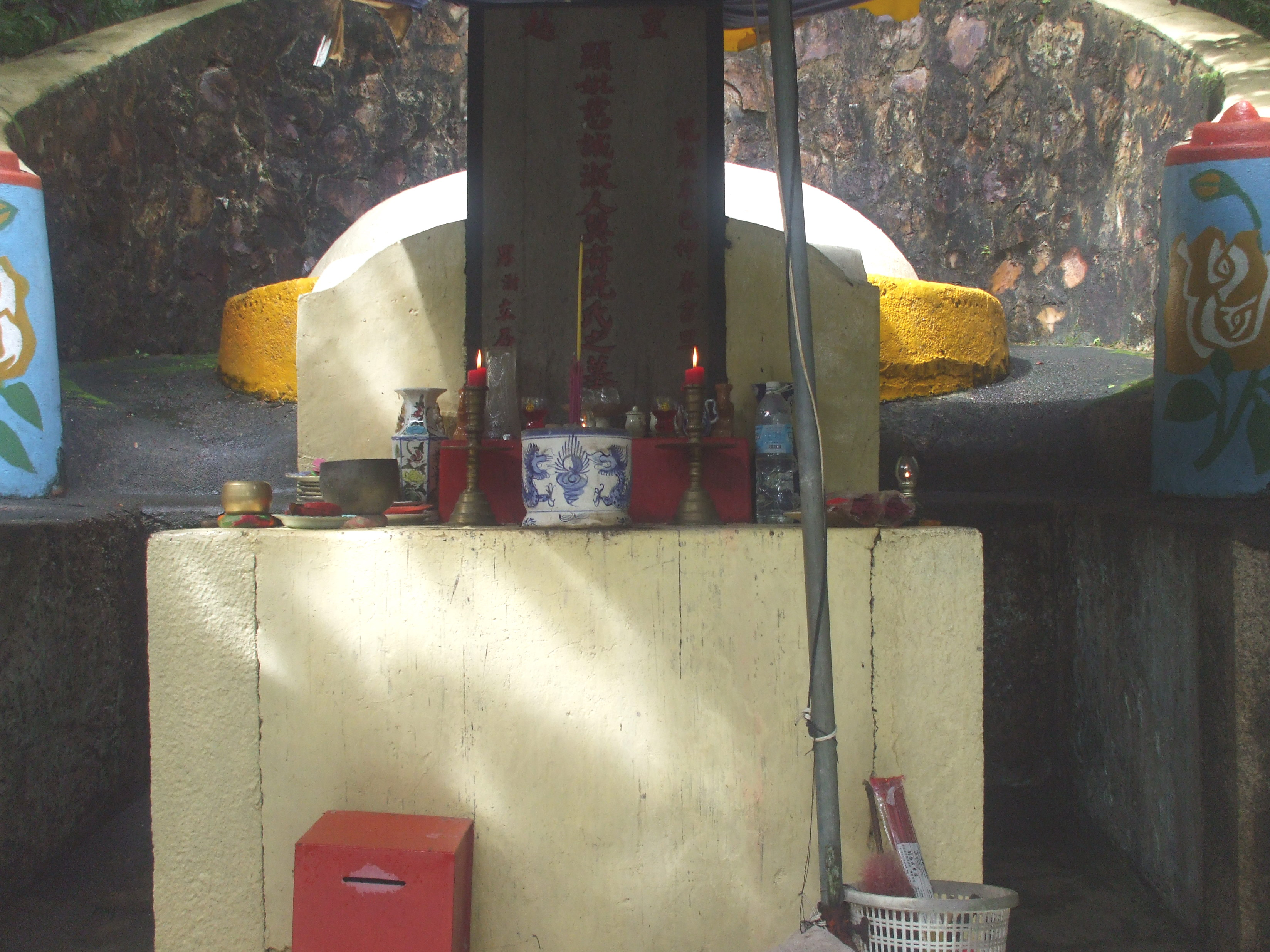 Mộ bà Phù Dung, chùa Phù Dung, Hà Tiên.